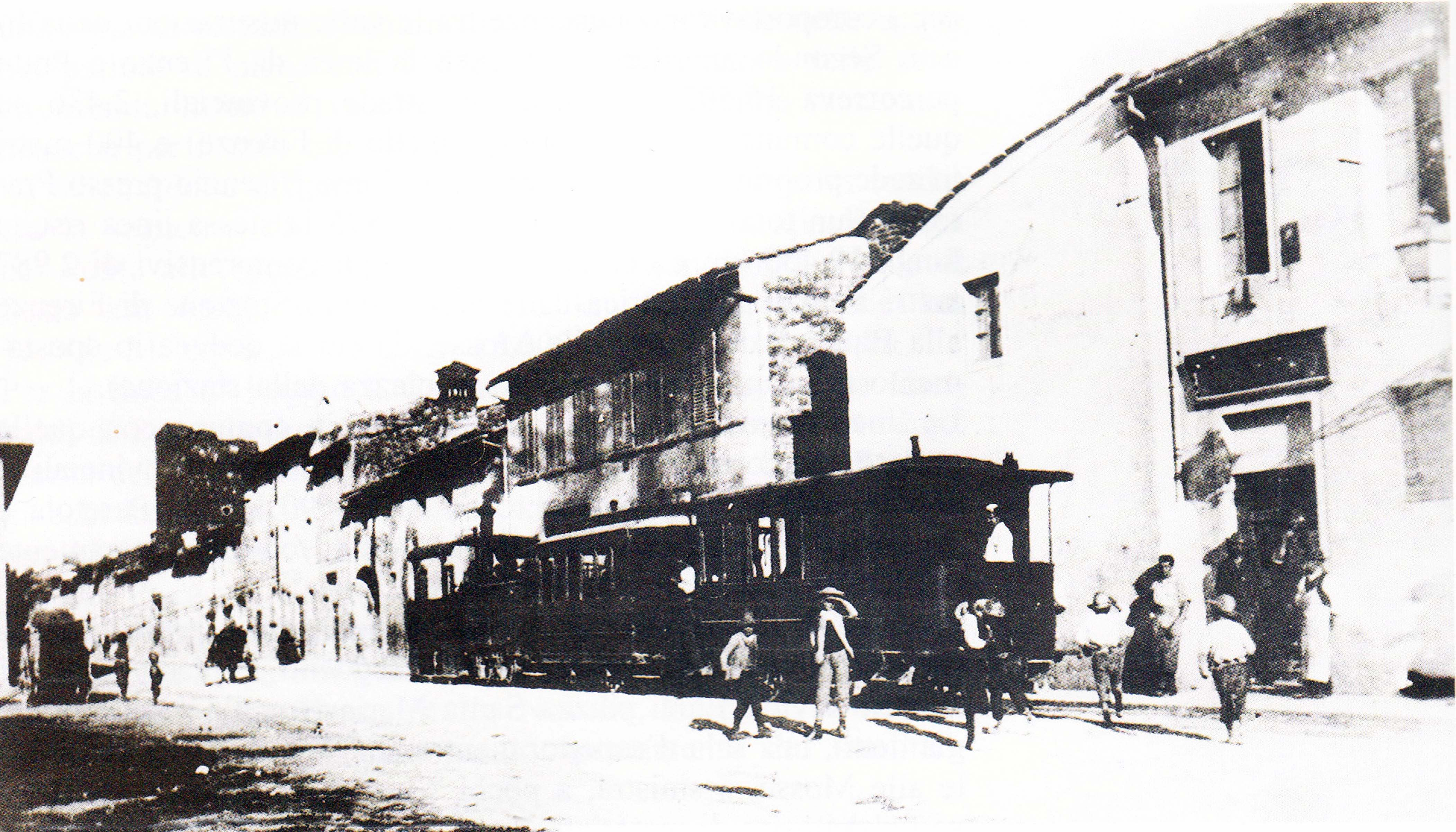 Convoglio tranviario in sosta sulla piazza principale di Brozzi (Firenze)